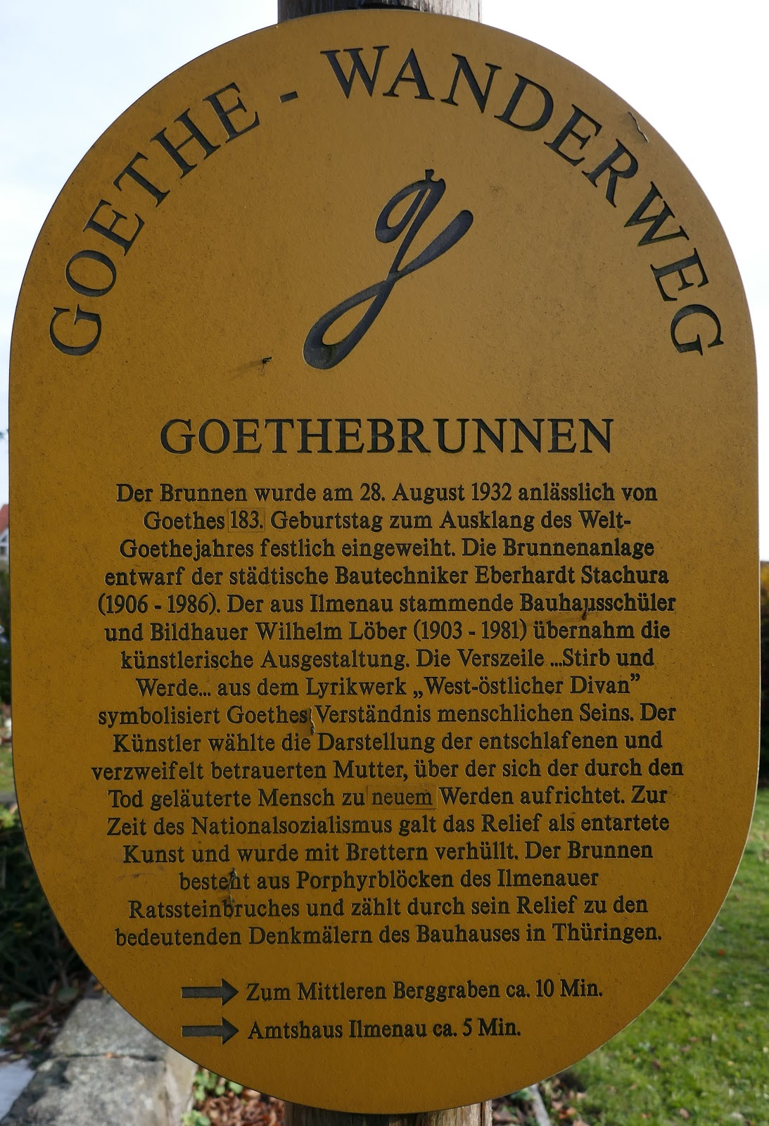 Goethebrunnen (Imenau): Wanderweg-Medaillon